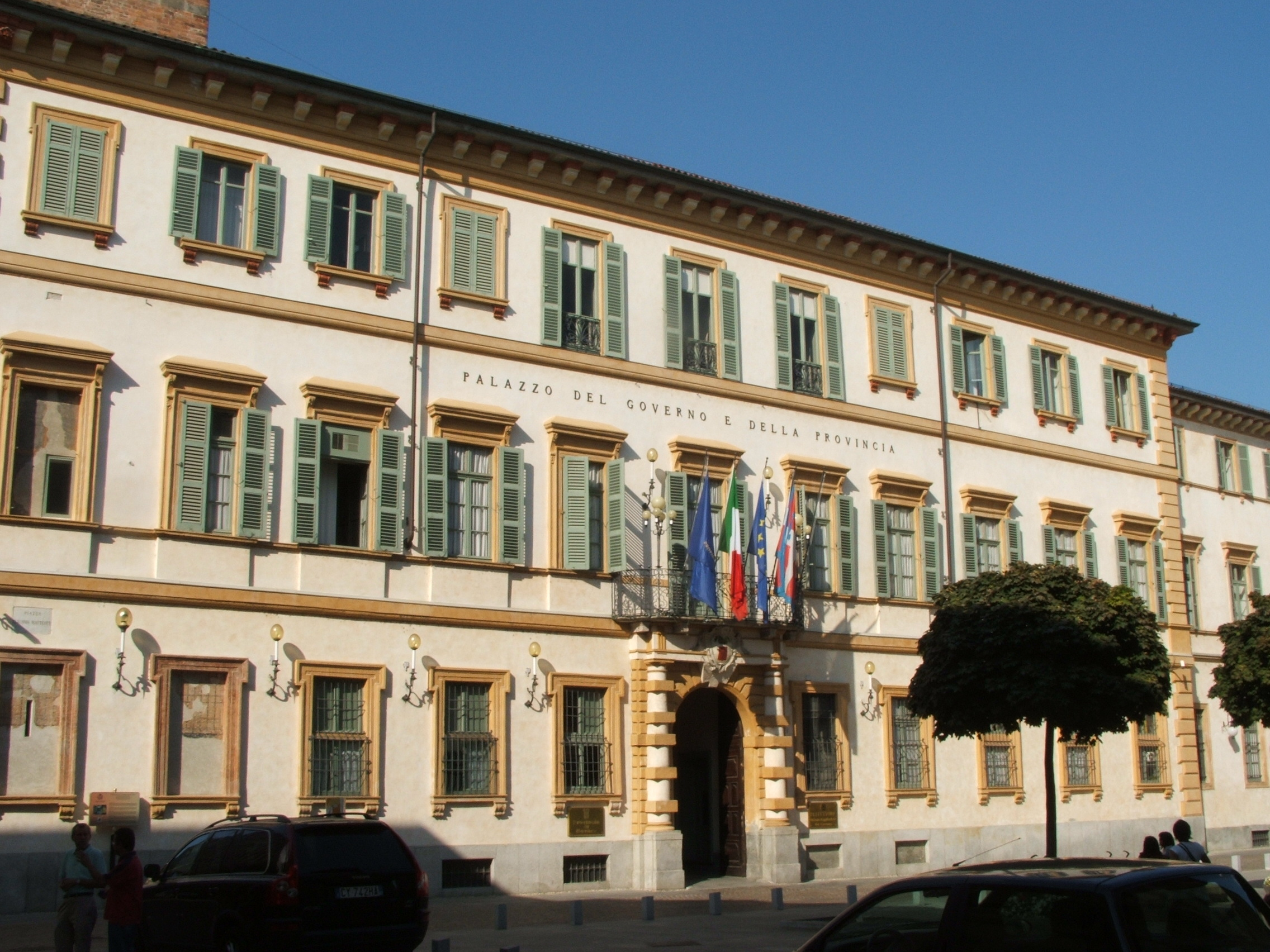 Il palazzo Natta-Isola (Prefettura) a Novara, Piemonte, Italia